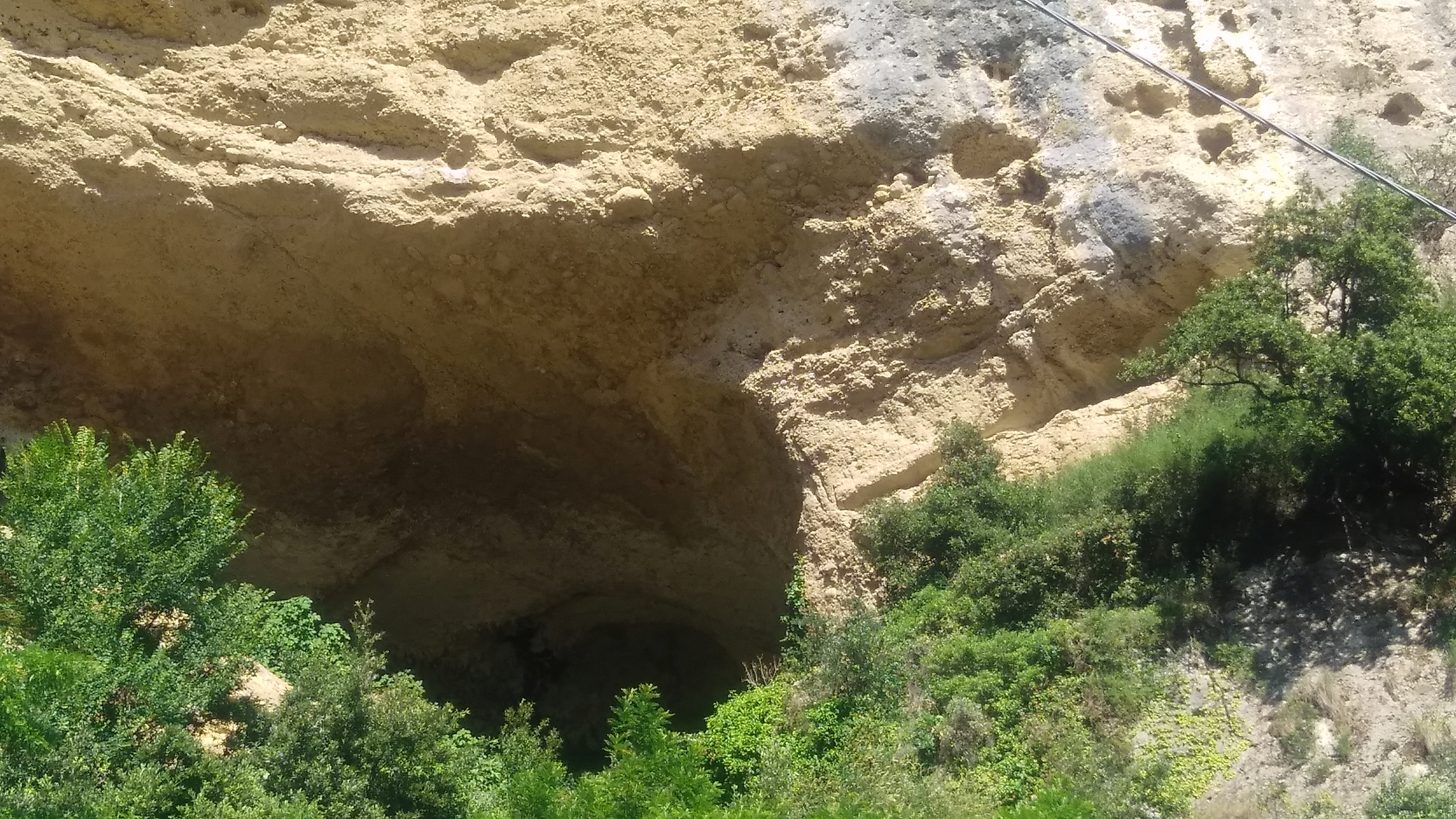 Roverino (Q49961358)